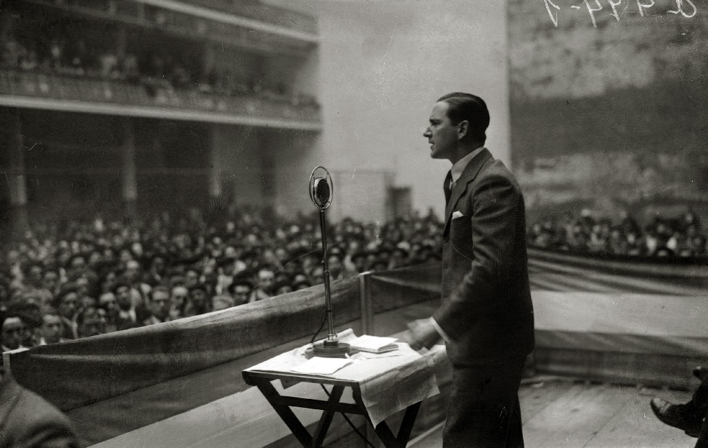 Título original: Telesforo Monzon durante un mitin político en un frontón (4/5) Localización: Guipúzcoa